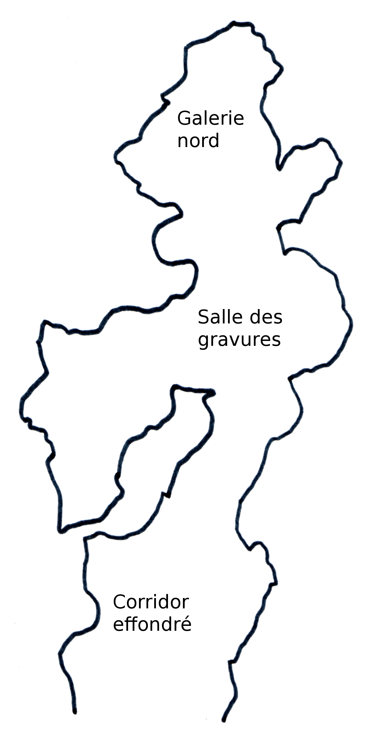 plan de la grotte de pair-non-pair au Mousterien